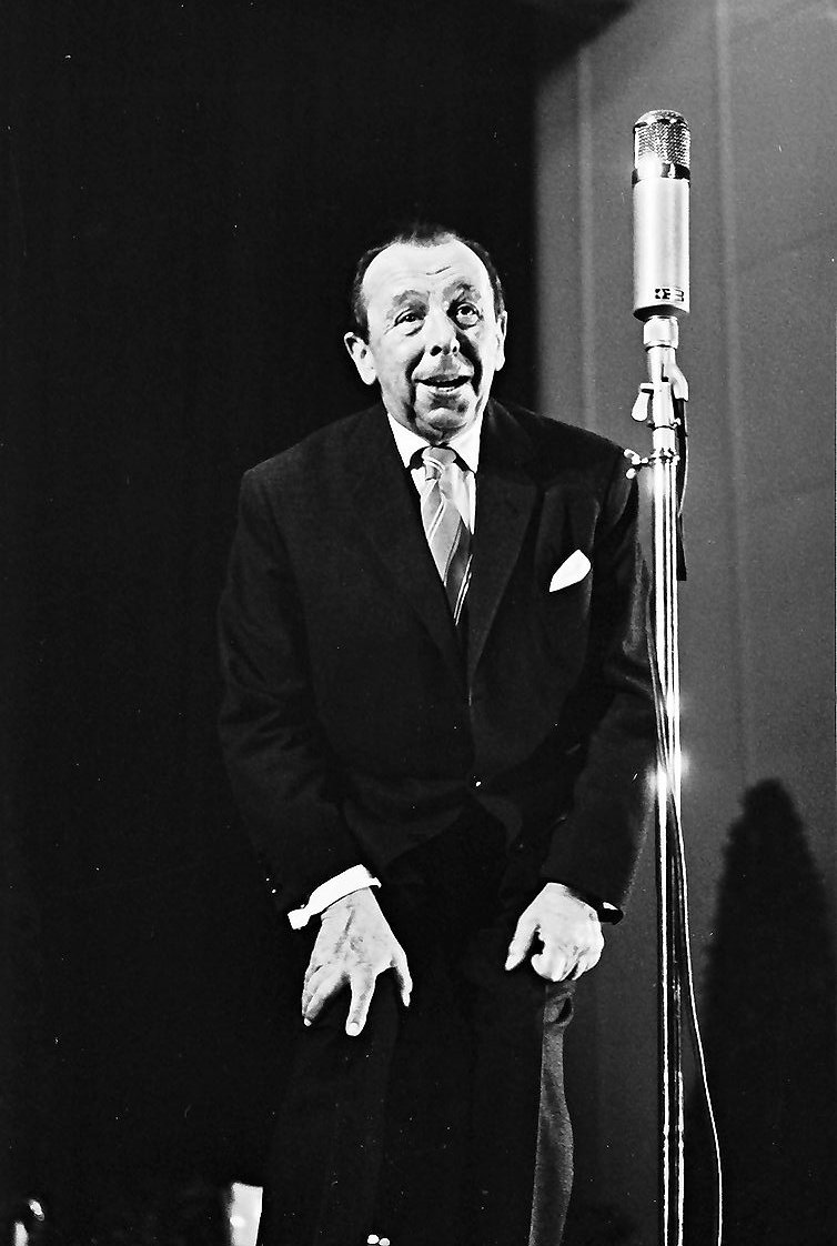 Variété Programm Mez: Willy Reichert